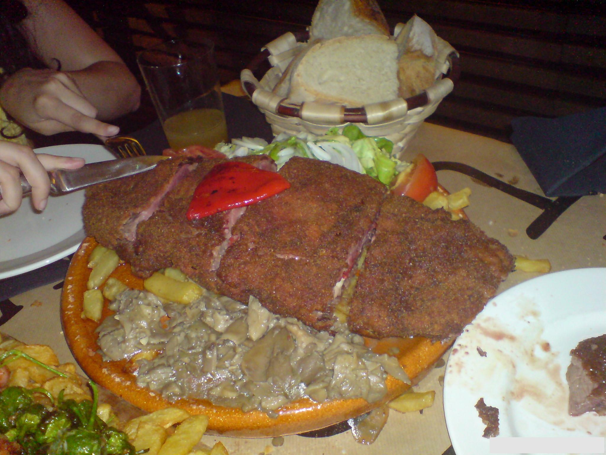 El Cachopo, una especialidad culinaria de la gastronomia asturiana